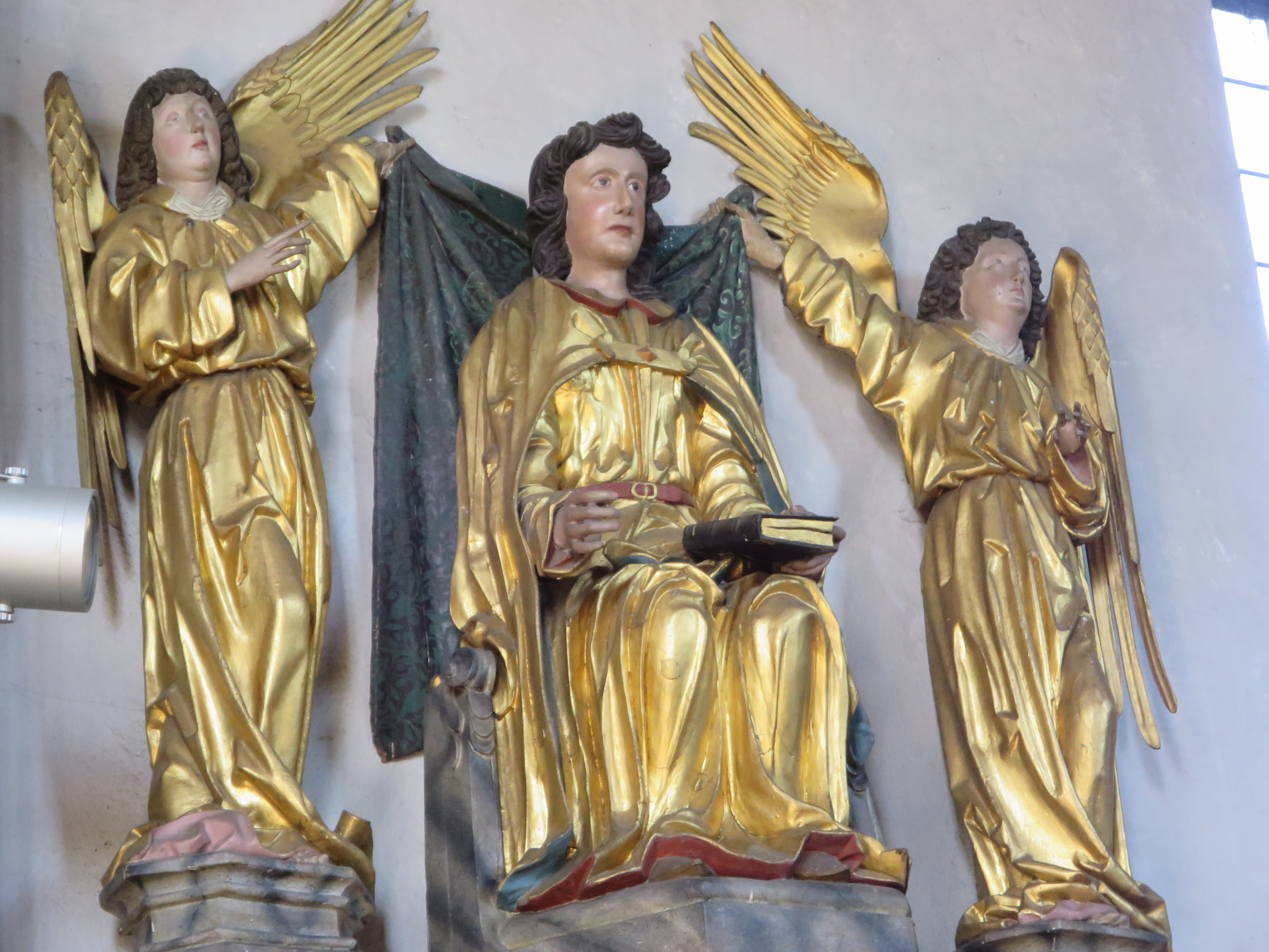 Engel im Chorraum links